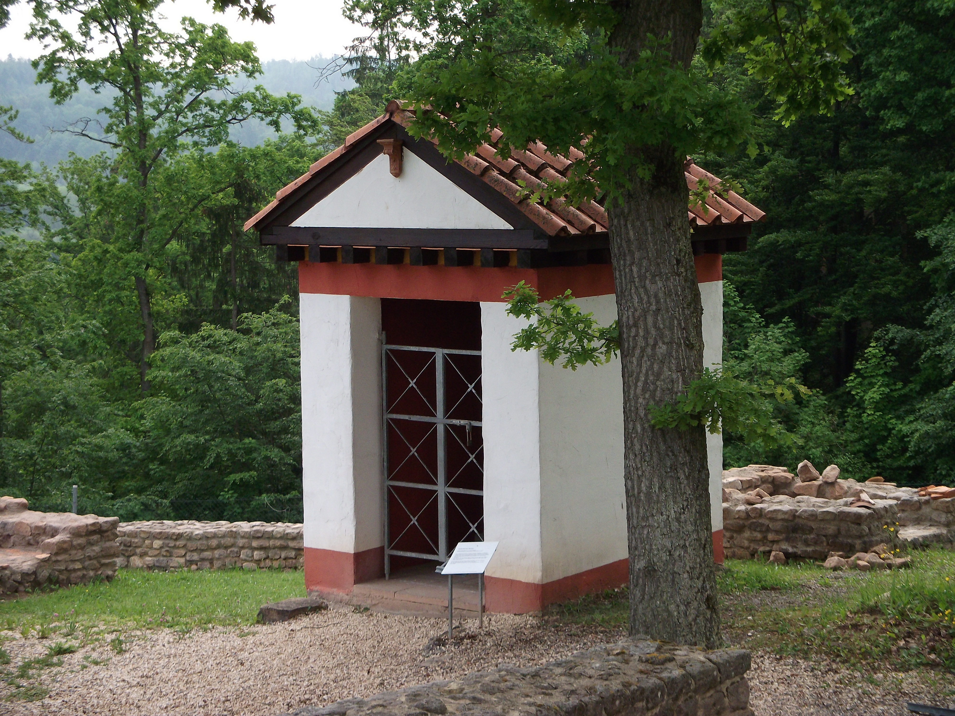 Rekonstruierte Kapelle im Tempelbezirk des Römisches Freilichtmuseum Hechingen-Stein